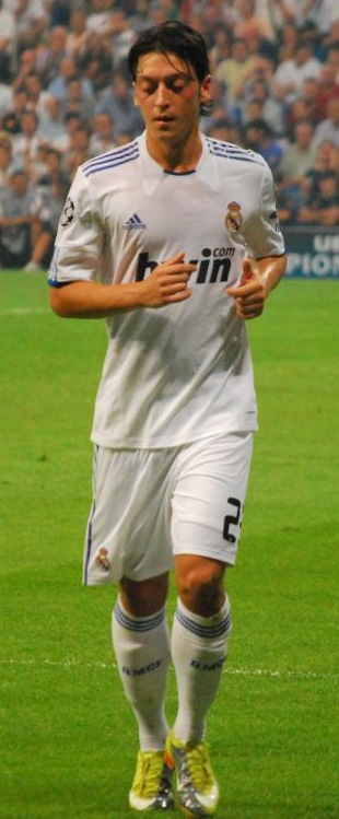 Primer partido de la Champions Legue Real Madrid 2 - Ajax 0 15 septiembre 2010